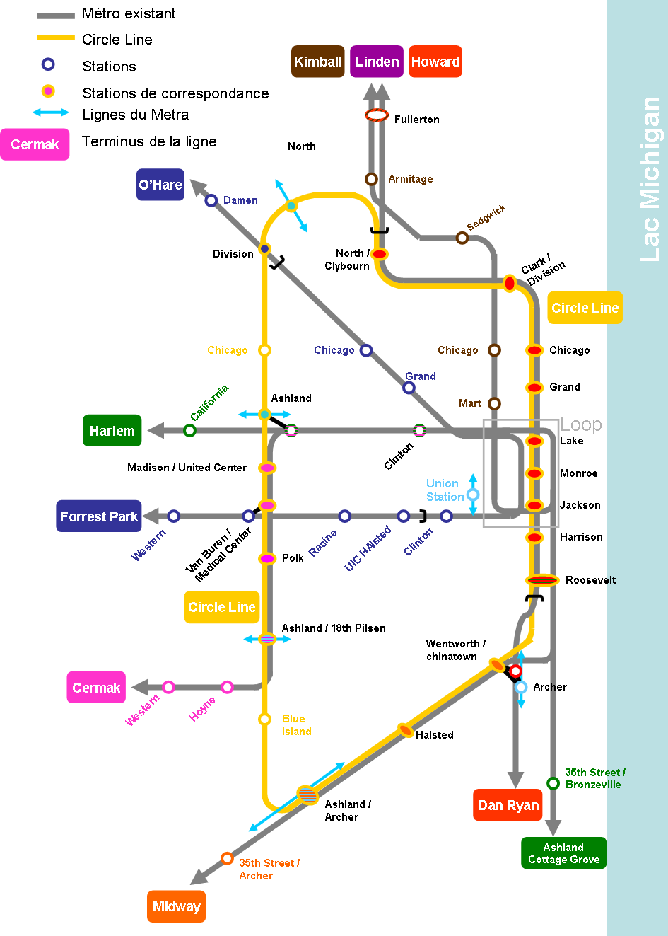 Update du fichier précedent de la Circle Line